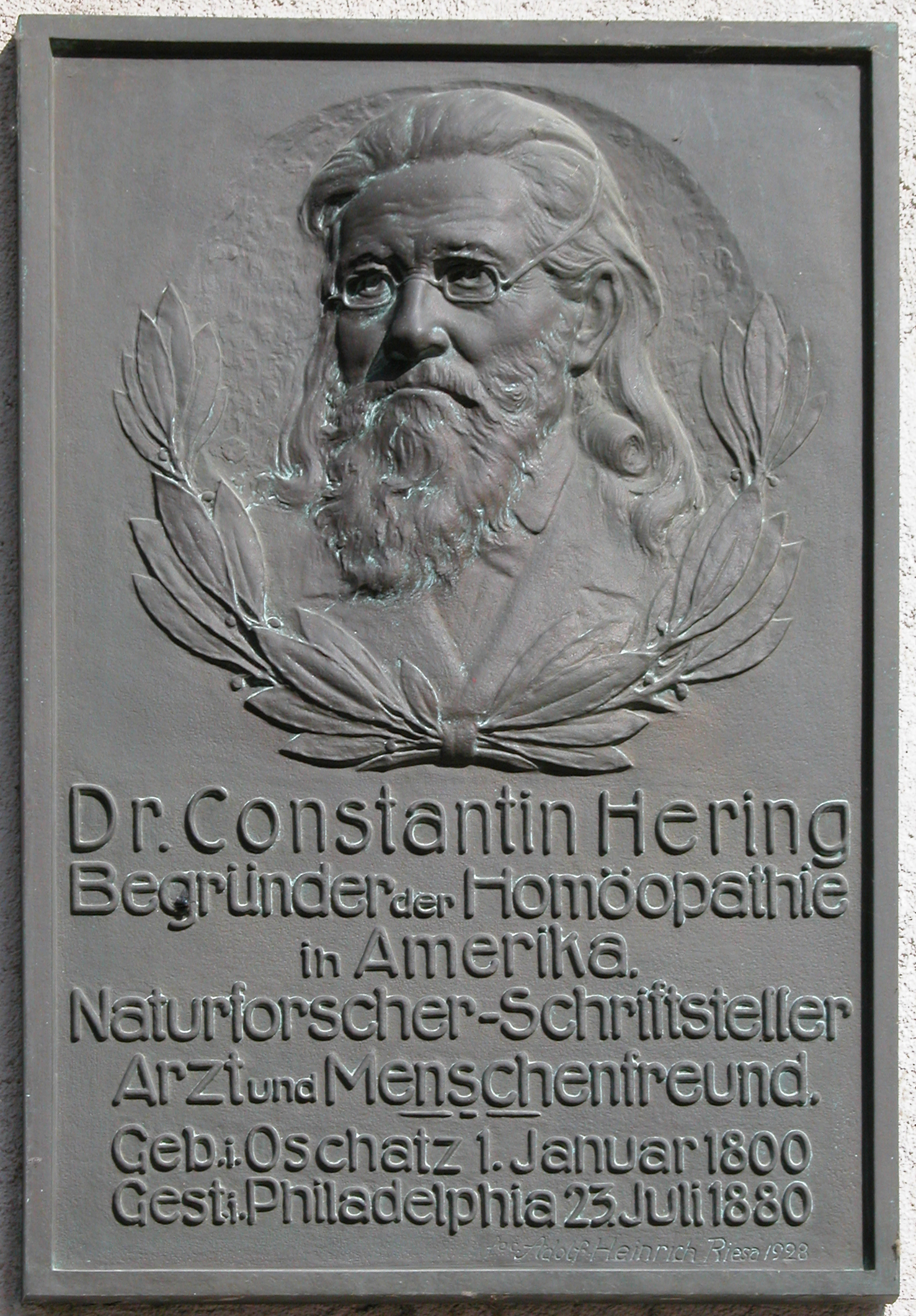 03.05.2009 04758 Oschatz, Kirchplatz: Gedenktafeln an der Alten Stadtschule (bis 1883) = Constantin Hering Haus. Dr. Constantin Hering, Begründer der Homöopathie in Amerika, Naturforscher-Schriftsteller, Arzt und Menschenfreund. Geb.: Oschatz 01.01.1800 Gest.: Philadelphia 23.07.1880 [DSCN37094.TIF]20090503100DR.JPG(c)Blobelt